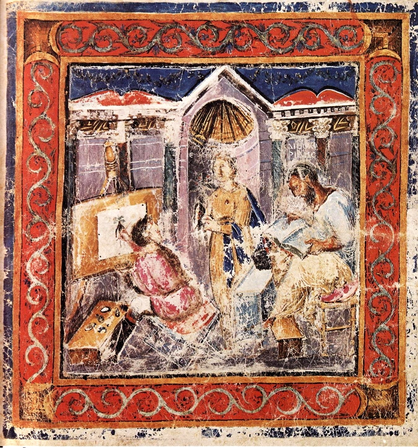 Eines der Autorenbilder aus dem Wiener Dioskurides (fol. 5 verso). Die allegorische Figur Epinoia (Denkkraft) hält eine Mandragoa. Der Maler schafft ein Abbild und Dioskurides (rechts) beschreibt die Pflanze